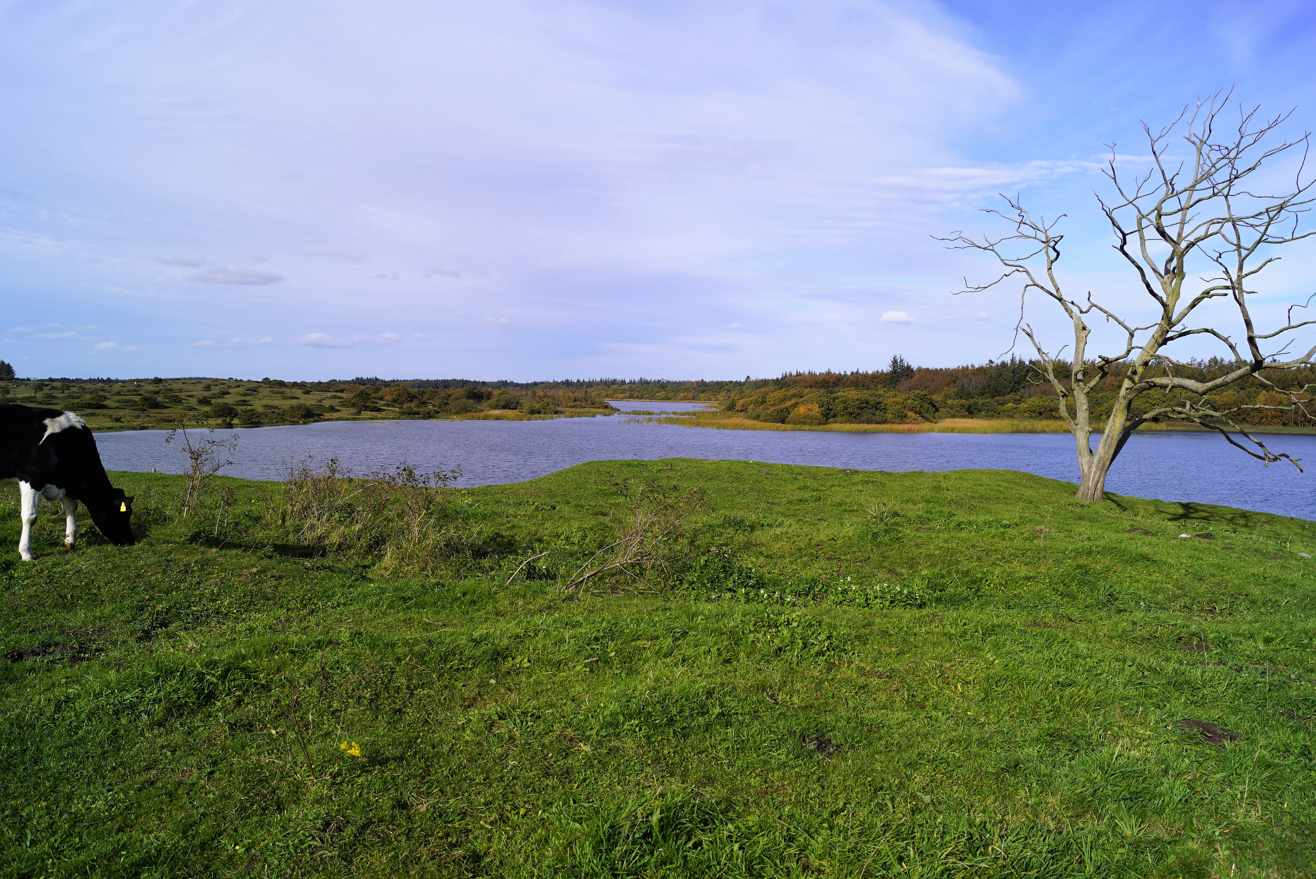 Stubbergård Sø set fra Stubberkloster, mod nord